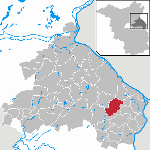 Seelow in Brandenburg (Country) - District Märkisch-Oderland